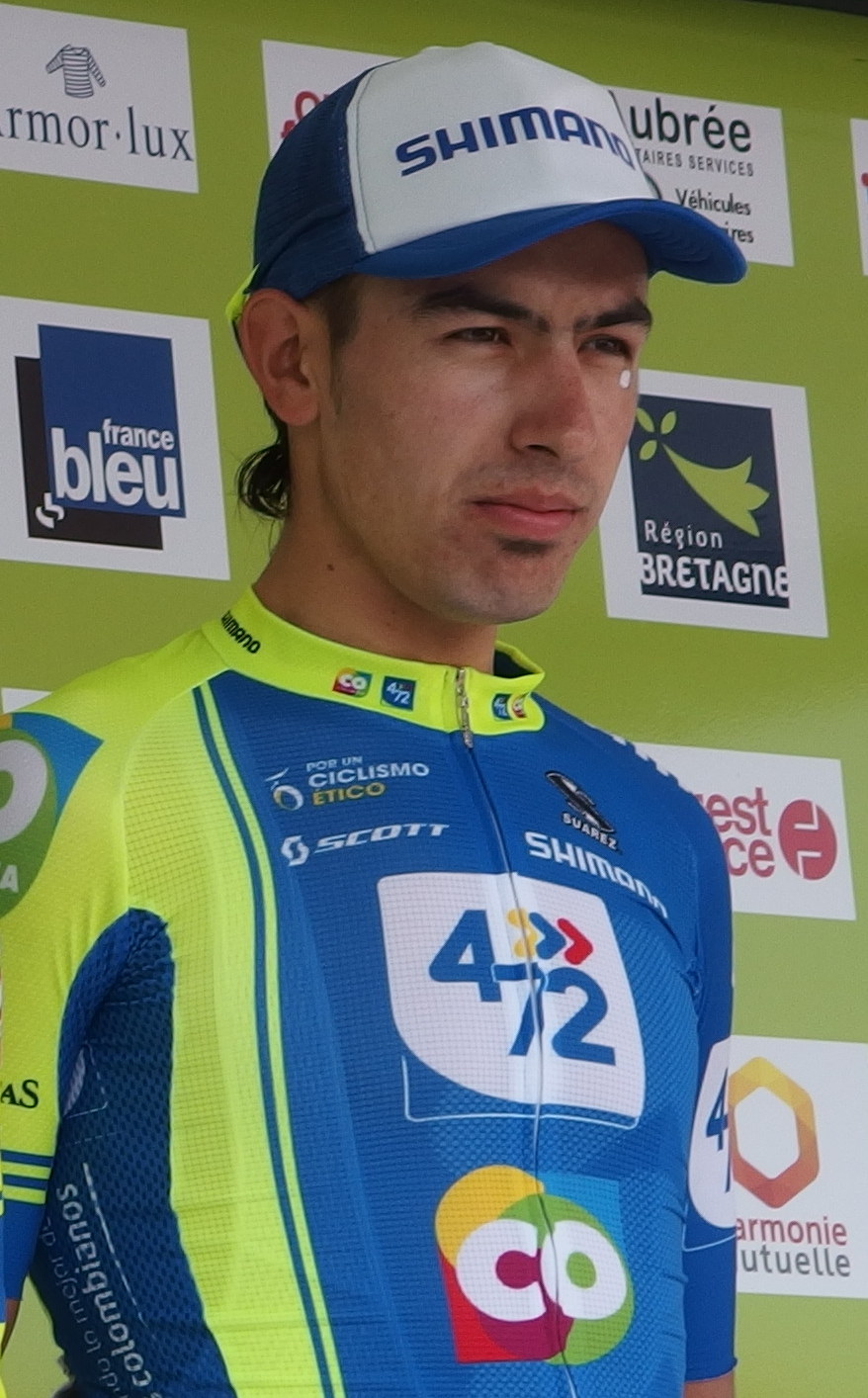 Tour de Bretagne 2014 - Présentation des équipes au départ de la sixième étape à Radenac - Équipe 472-Colombia Depicted person: Bernardo Suaza